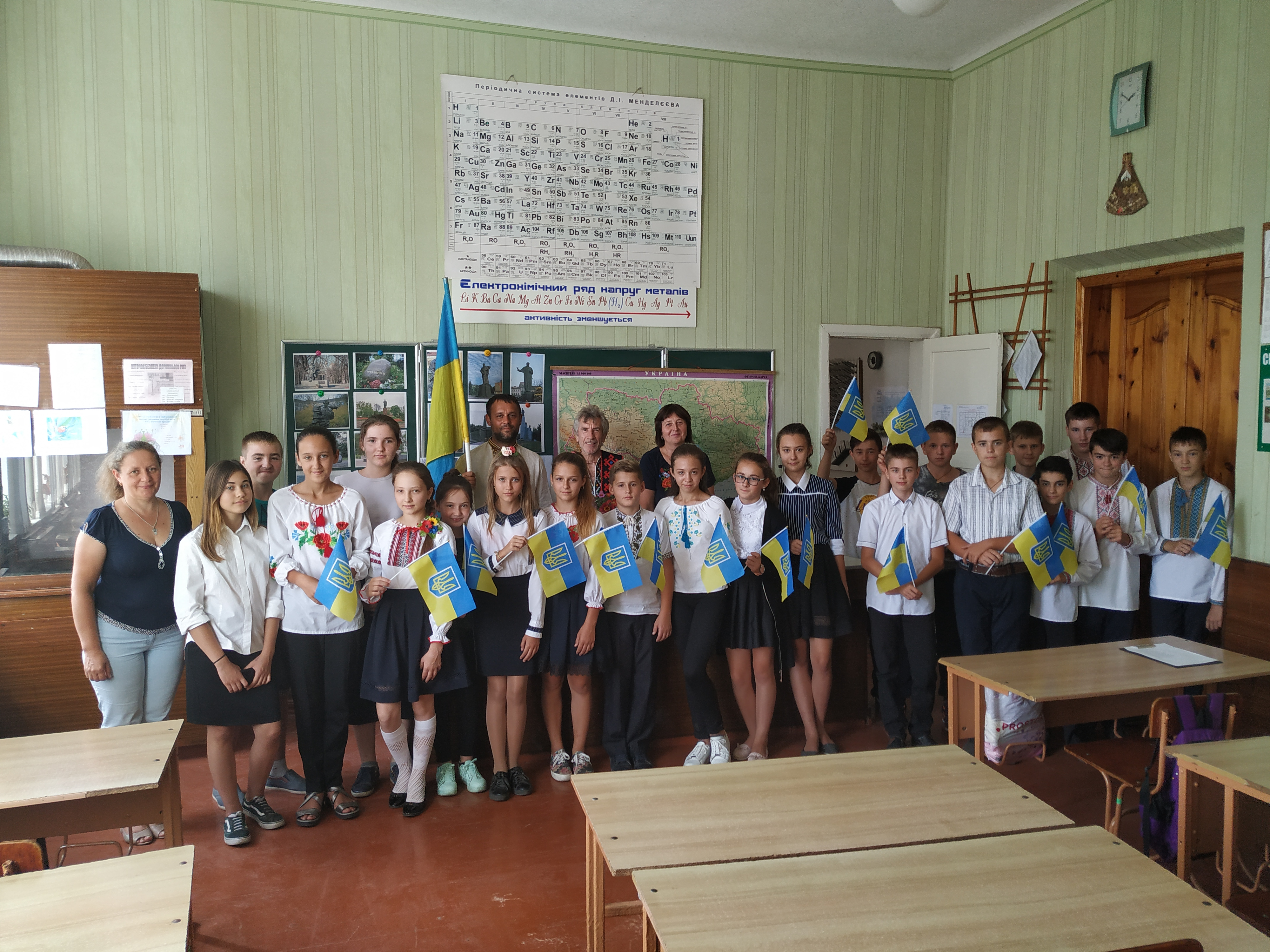 ТД 2-06 Охтирка